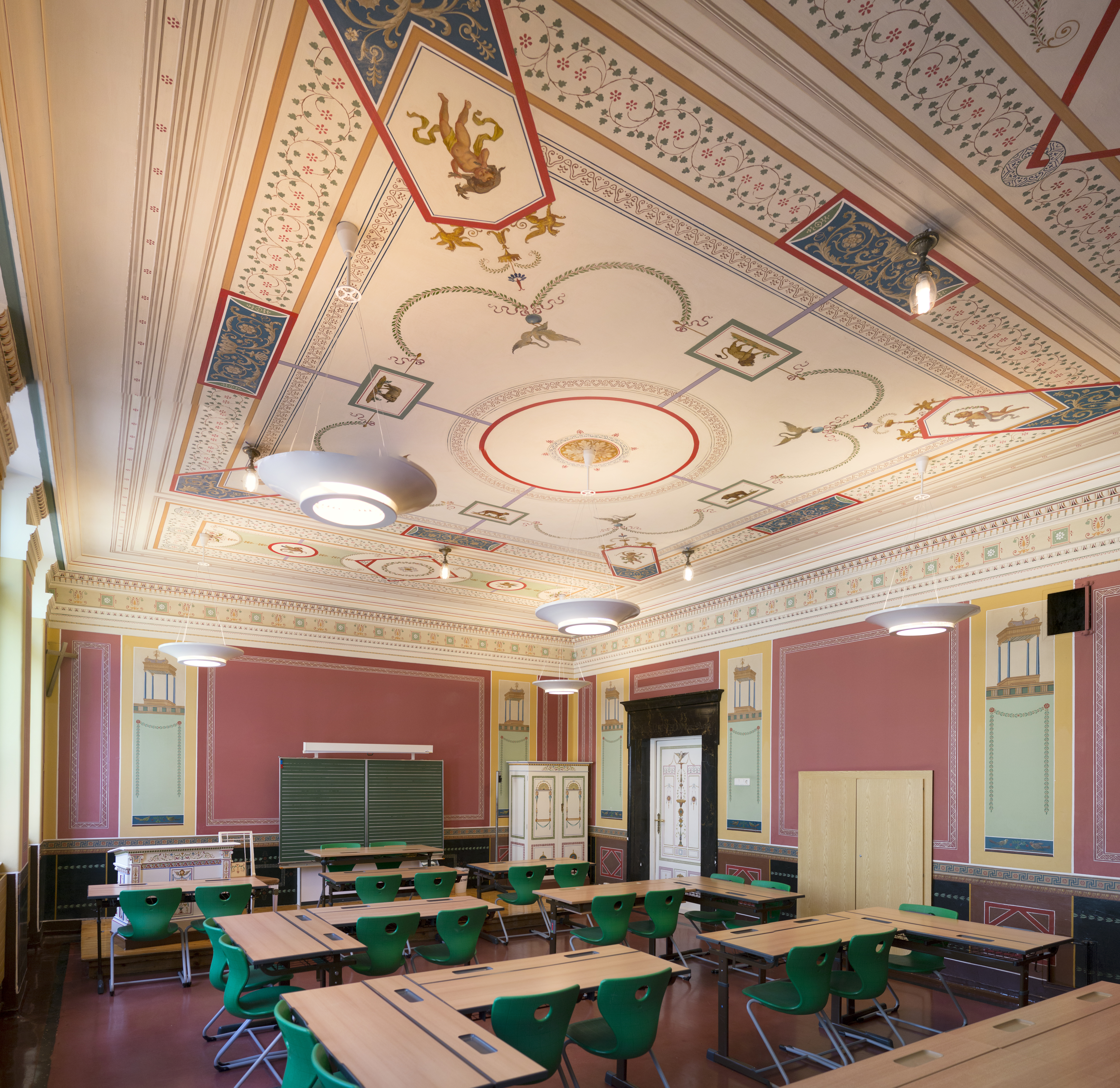 Berndorfer Stilklassen Pompeianisches Zimmer gesamt